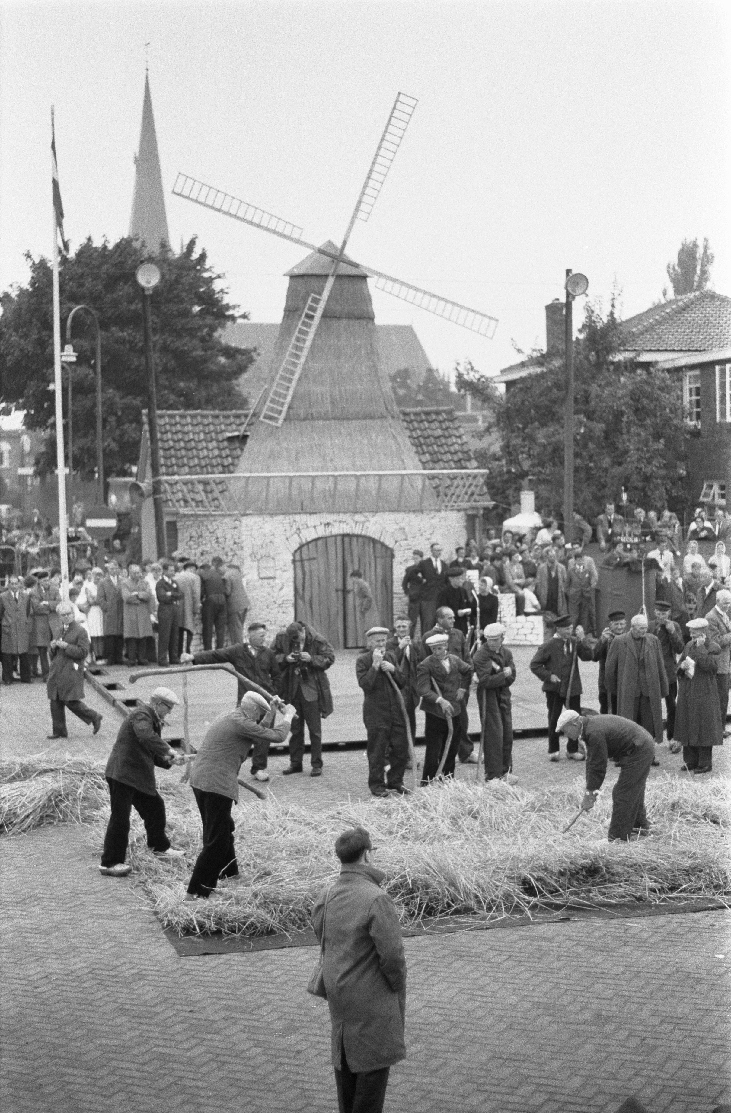 Collectie / Archief : Fotocollectie Anefo Reportage / Serie : [ onbekend ] Beschrijving : Stoppelhaenefeest in Raalte Datum : 24 augustus 1961 Locatie : Raalte Trefwoorden : feesten, stoppelhaenen Fotograaf : Rossem, Wim van / Anefo Auteursrechthebbende : Nationaal Archief Materiaalsoort : Negatief (zwart/wit) Nummer archiefinventaris : bekijk toegang 2.24.01.05 Bestanddeelnummer : 912-8655